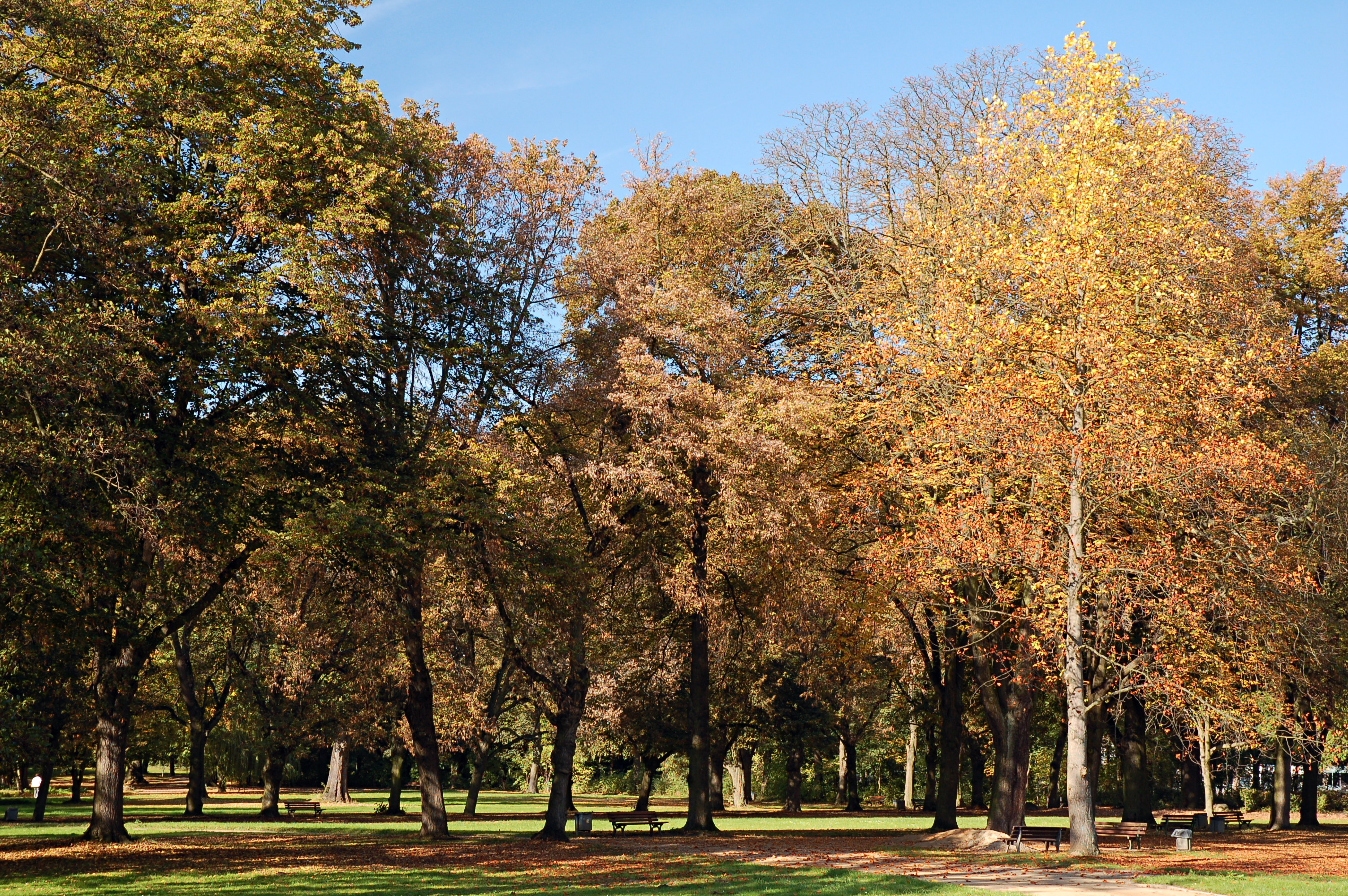 Ansichten aus dem Höchster Stadtpark